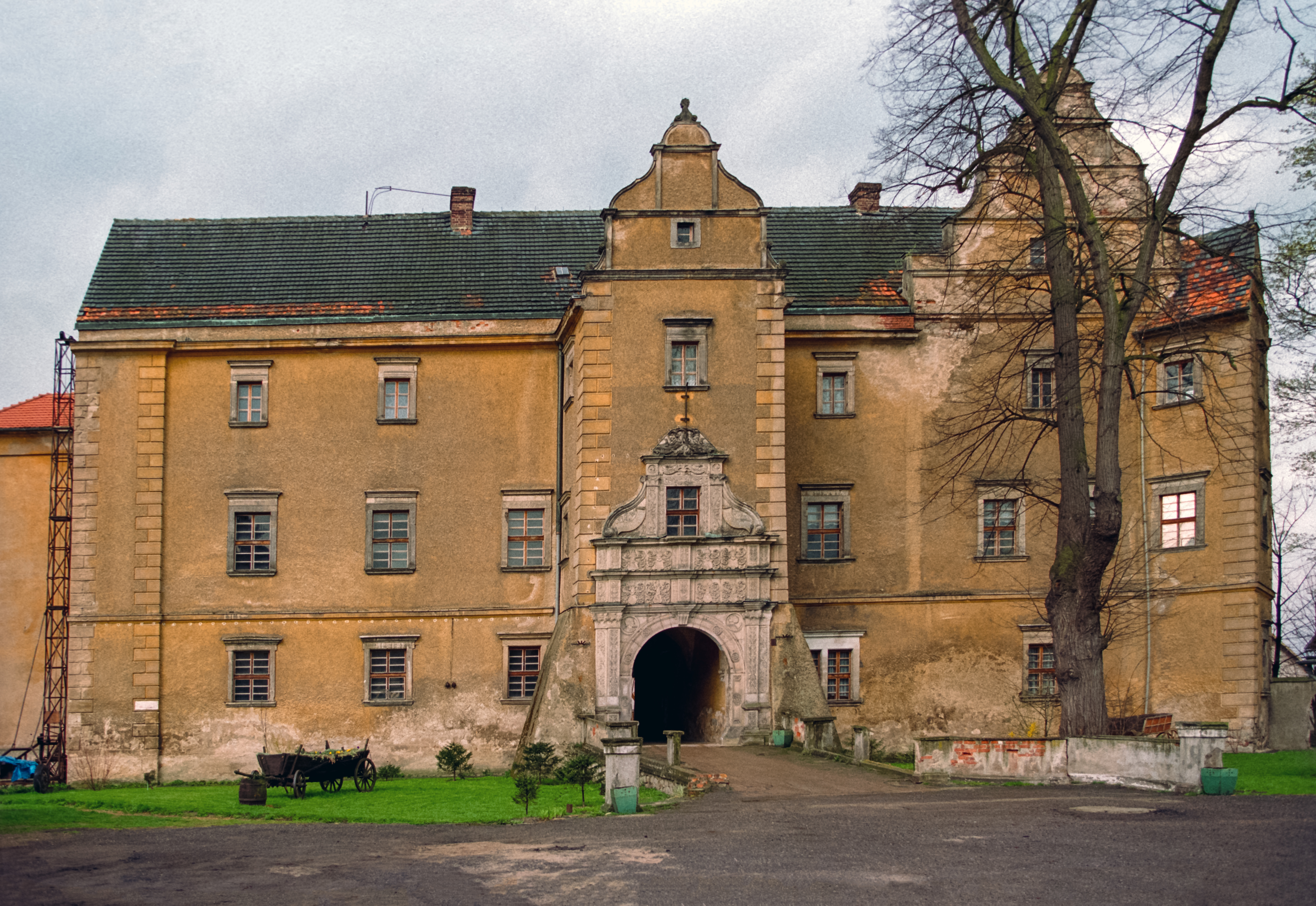 Zamek łakowice